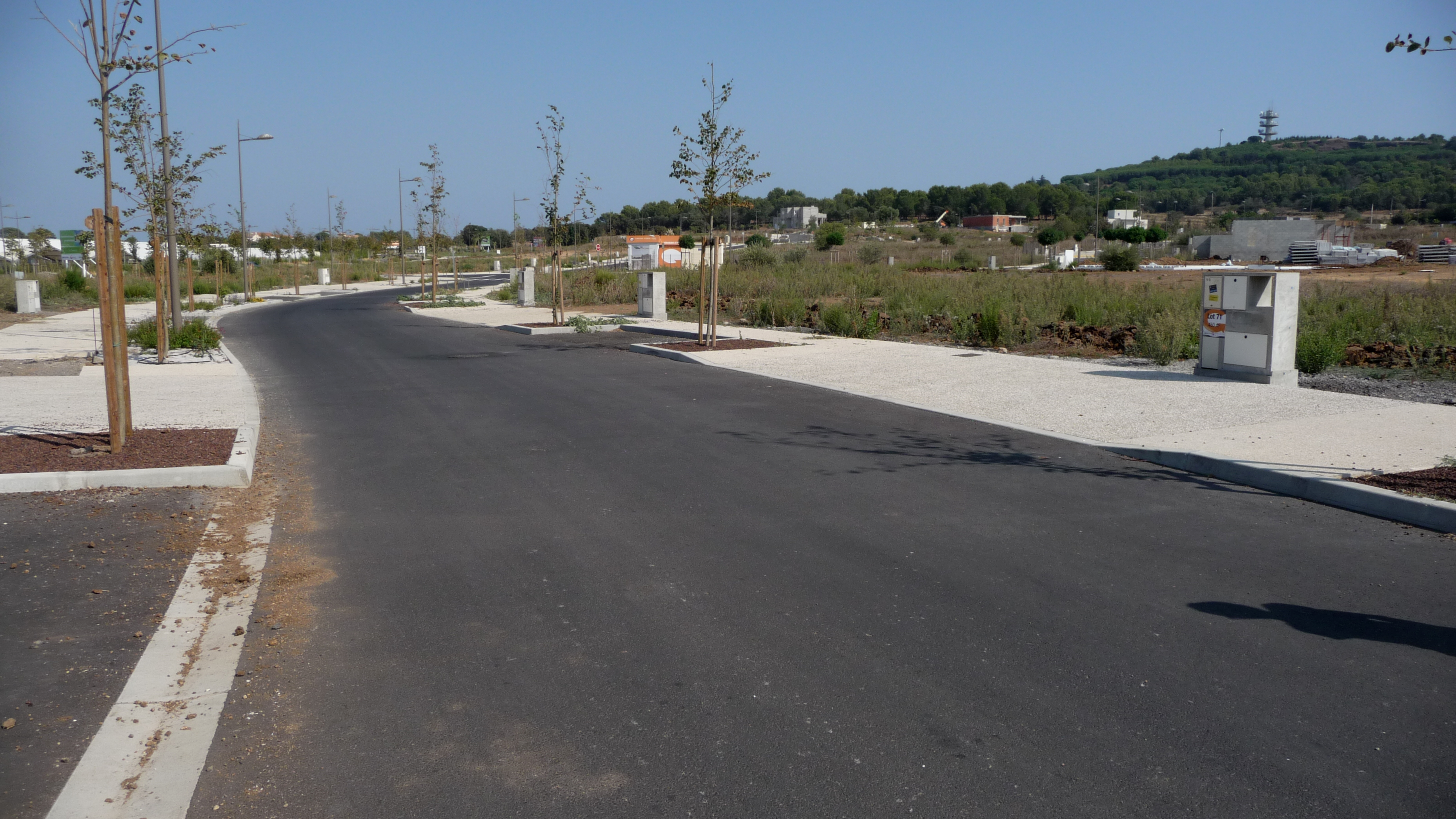 Vue du lotissement du Capiscol à Agde (Hérault, France).